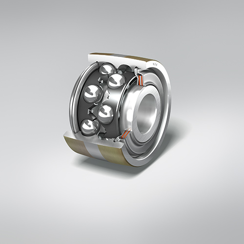 Roller cut Bearing